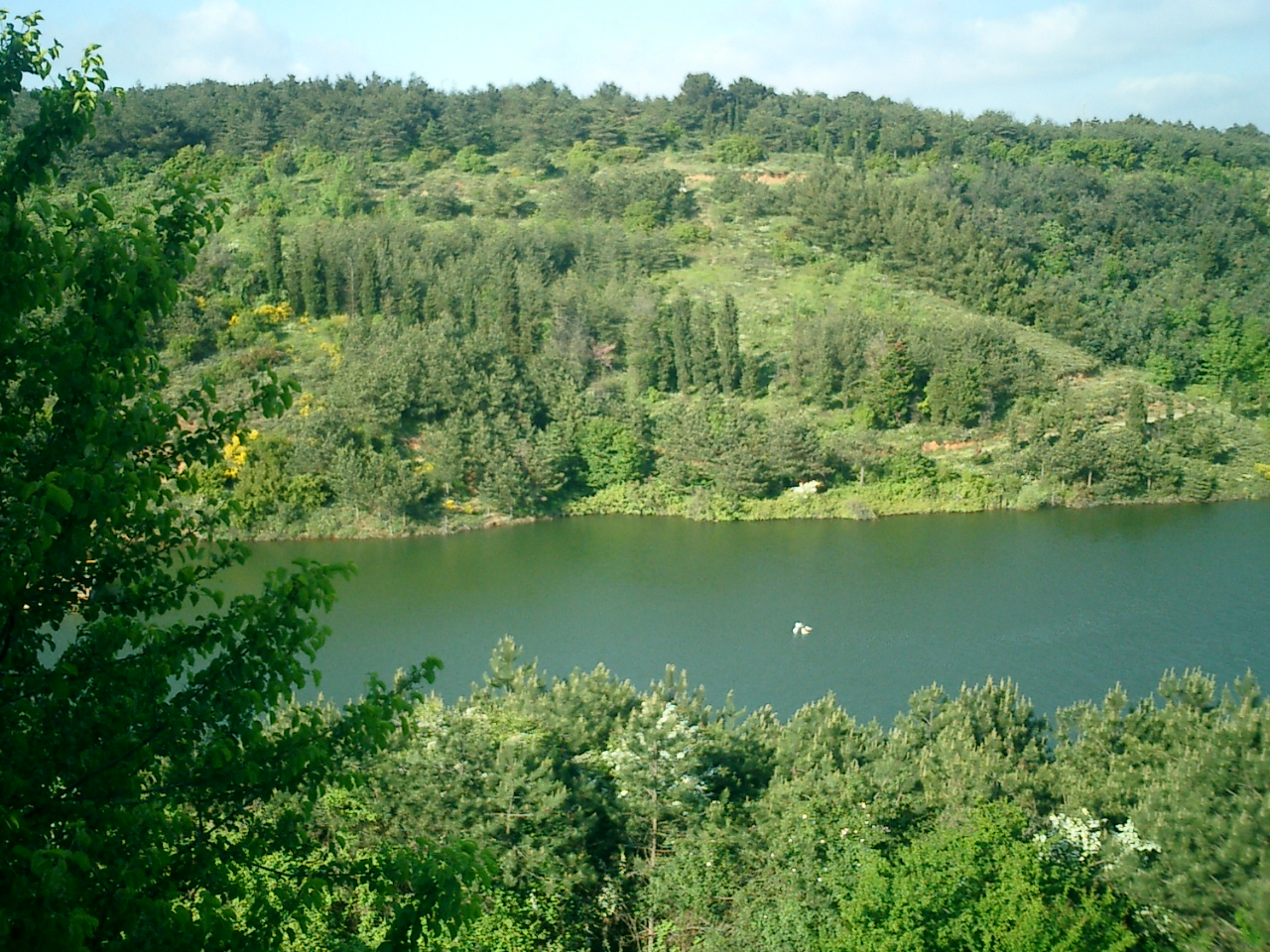 İTÜ Maslak yerleşkesindeki gölet